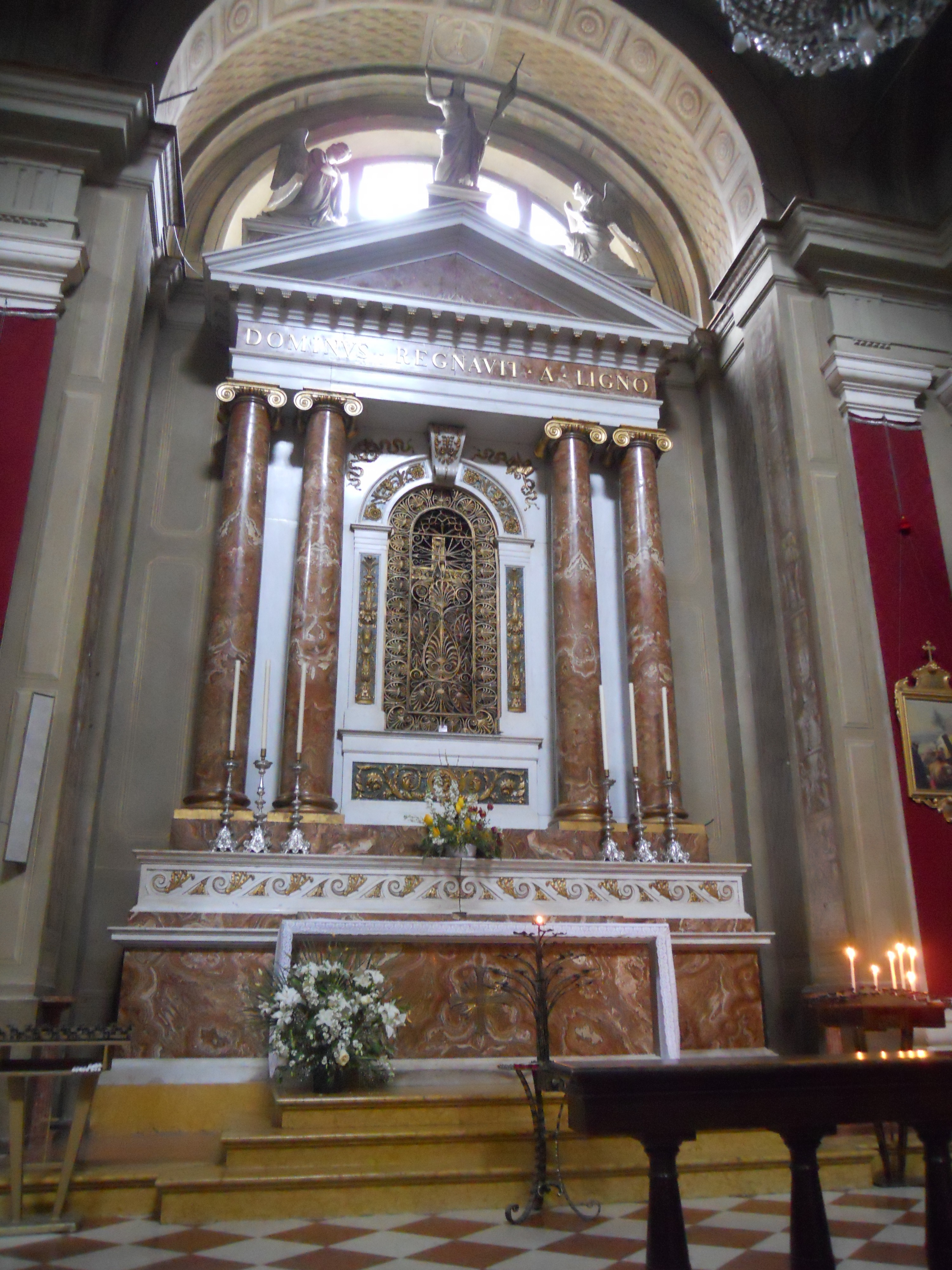 San Faustino maggiore (Brescia) (altare santa croce)